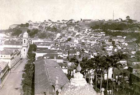 Morro do Castelo, aproximadamente 1893/1894. Vista tomada da torre da igreja do Carmo. Em primeiro plano, à esquerda, as ruas da Misericórdia e Direita (atuais Presidente Antônio Carlos e Primeiro de Março); à esquerda, fachadas do Paço Imperial, Câmara dos Deputados e Igreja de São José. No fundo, o morro do Castelo, destacando-se o Colégio e Igreja dos Jesuítas. Foto de Juan Gutierrez. Galeria do Museu Histórico Nacional.